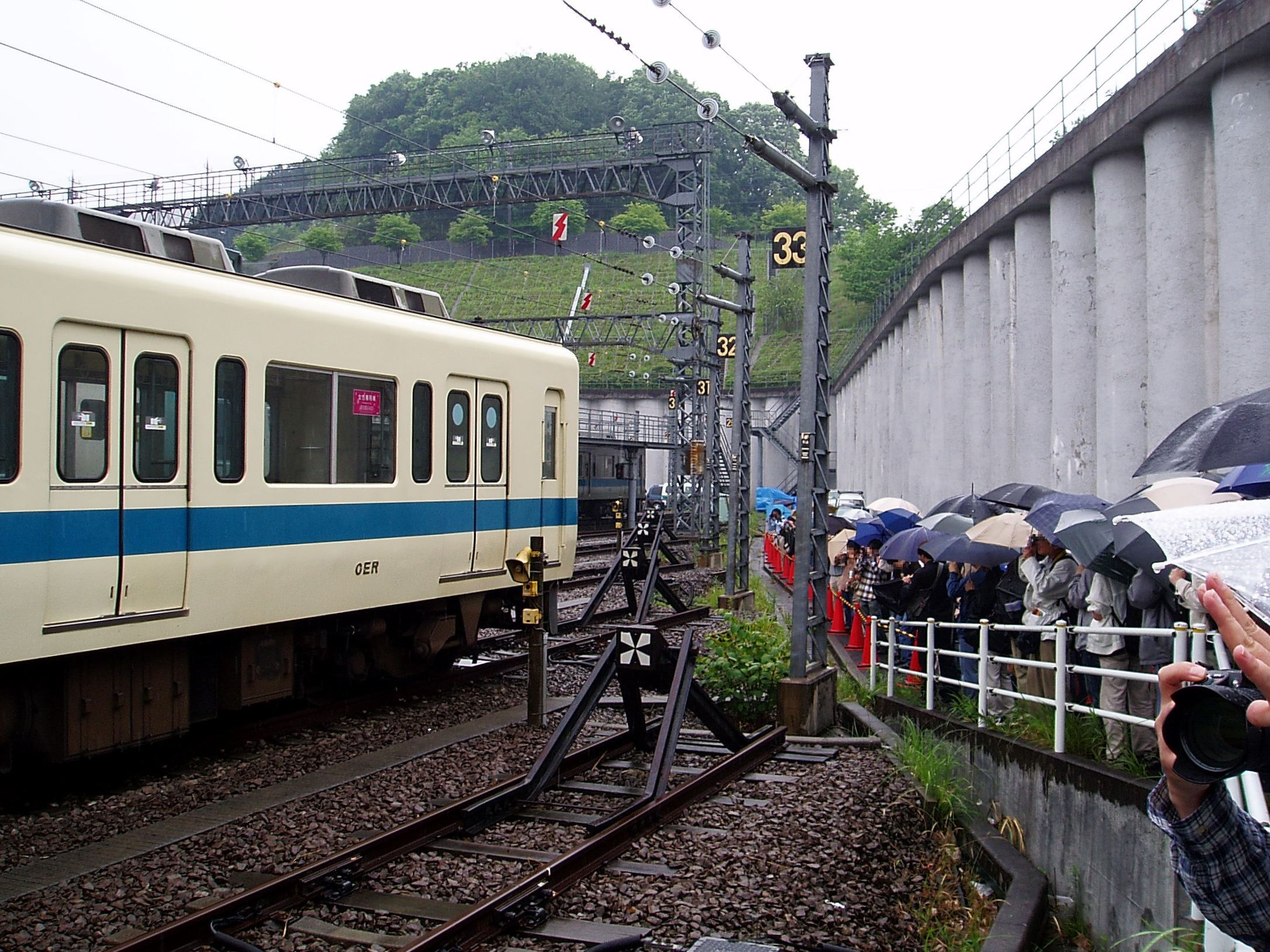 小田急9000形電車のさよなら運転後のイベントで撮影を行なう人々